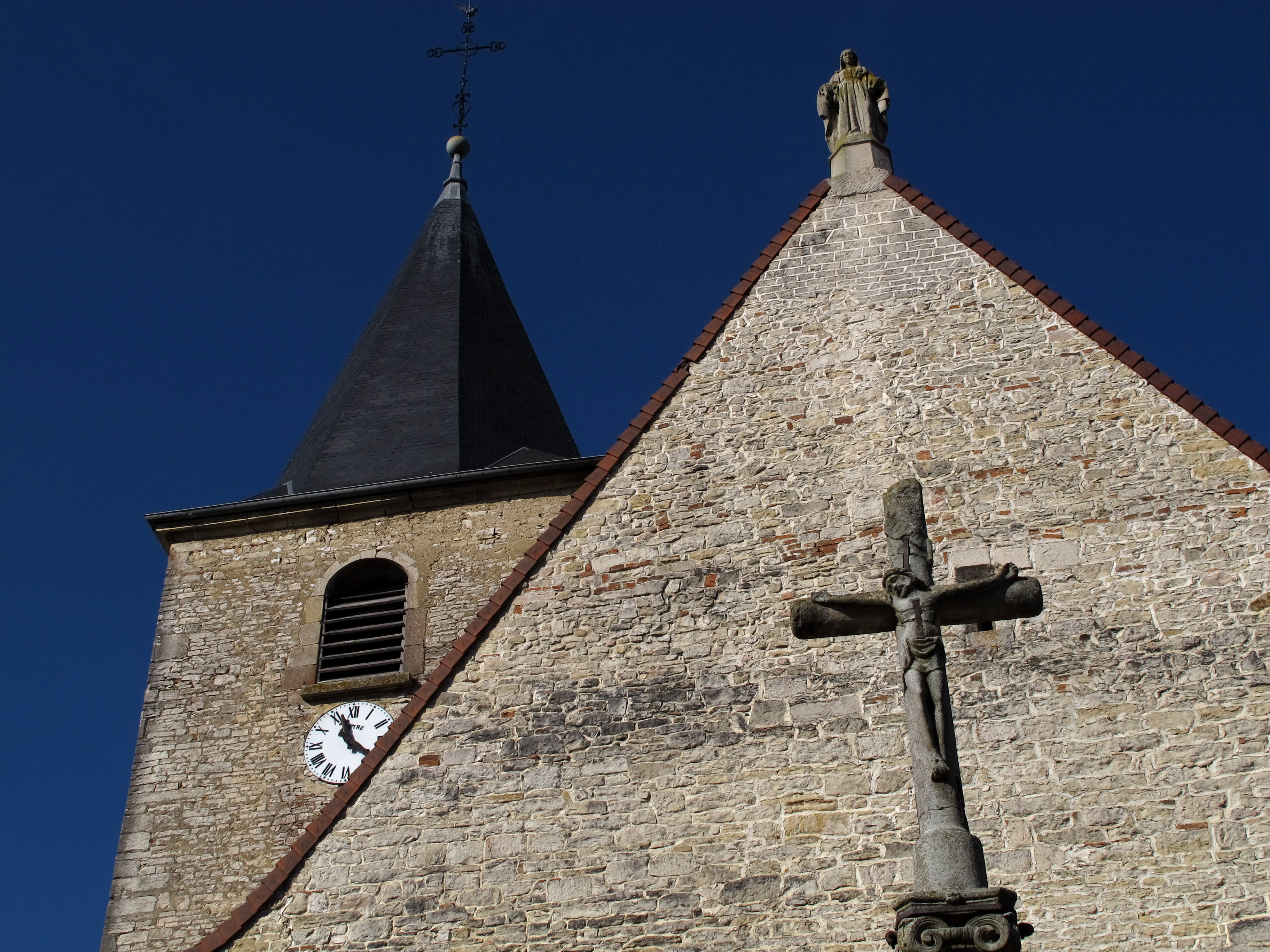 Longwy sur le Doubs. Église de l'Assomption-de-Notre-Dame.